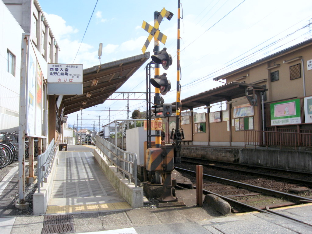 嵯峨駅前駅（現嵐電嵯峨駅）(2007.02.15に投稿者が撮影)